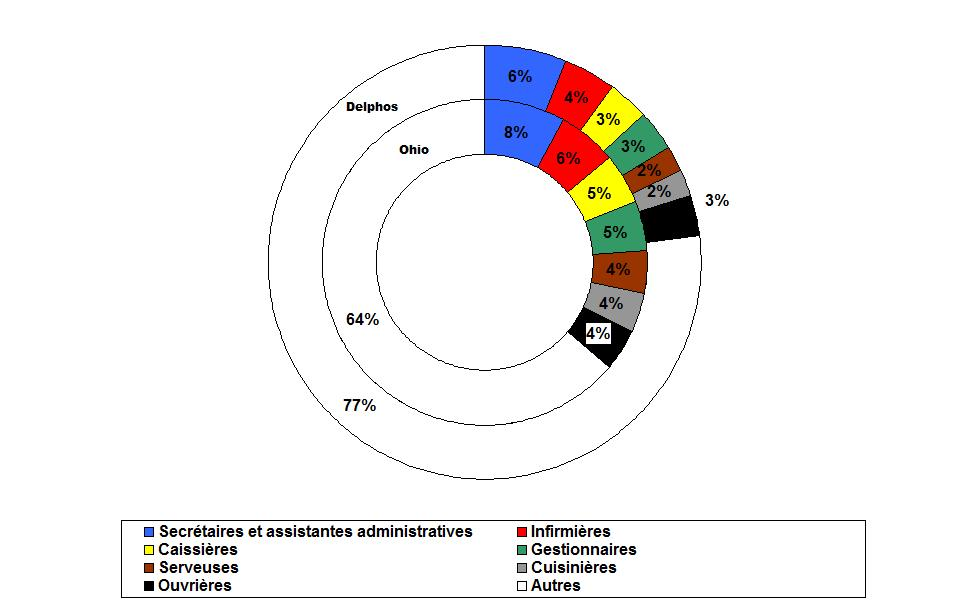 Principaux emplois féminins à Delphos (Ohio - Etats-Unis) en 2009